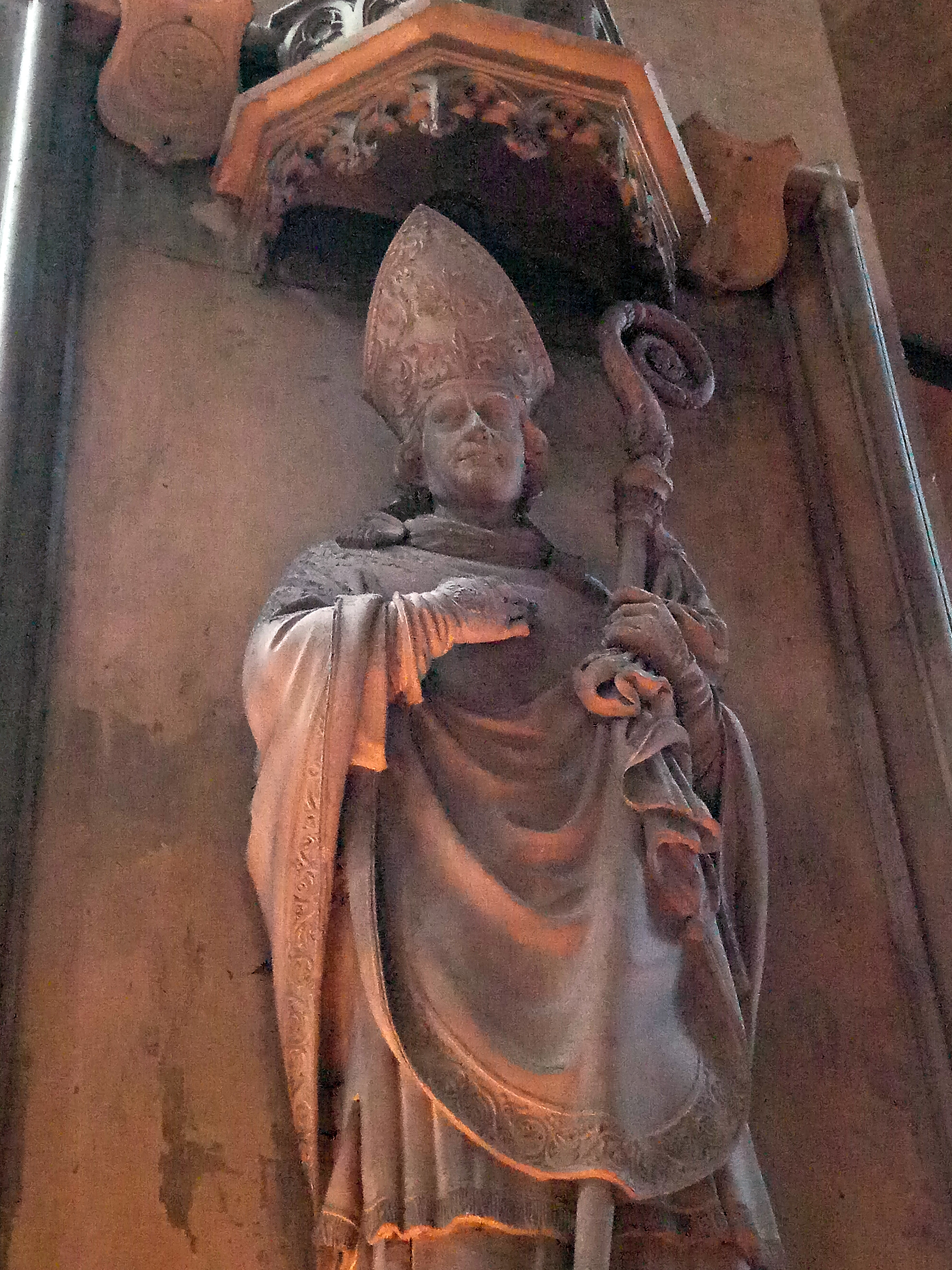 Mainzer Dom, Grabfigur Bischof Johann Jakob Humann (+ 1834)